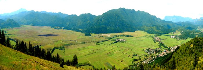 Cerkniško polje, prazno jezero